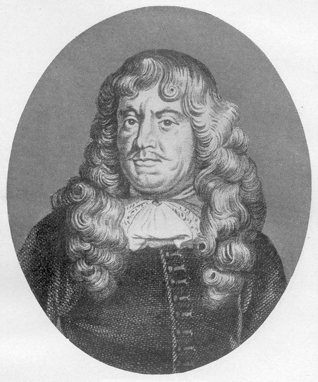 Nikolaes Heinsius the Elder (1620–1681) Nikolaes Heinsius der Ältere (1620–1681) Nikolaas Heinsius (1620–1681)